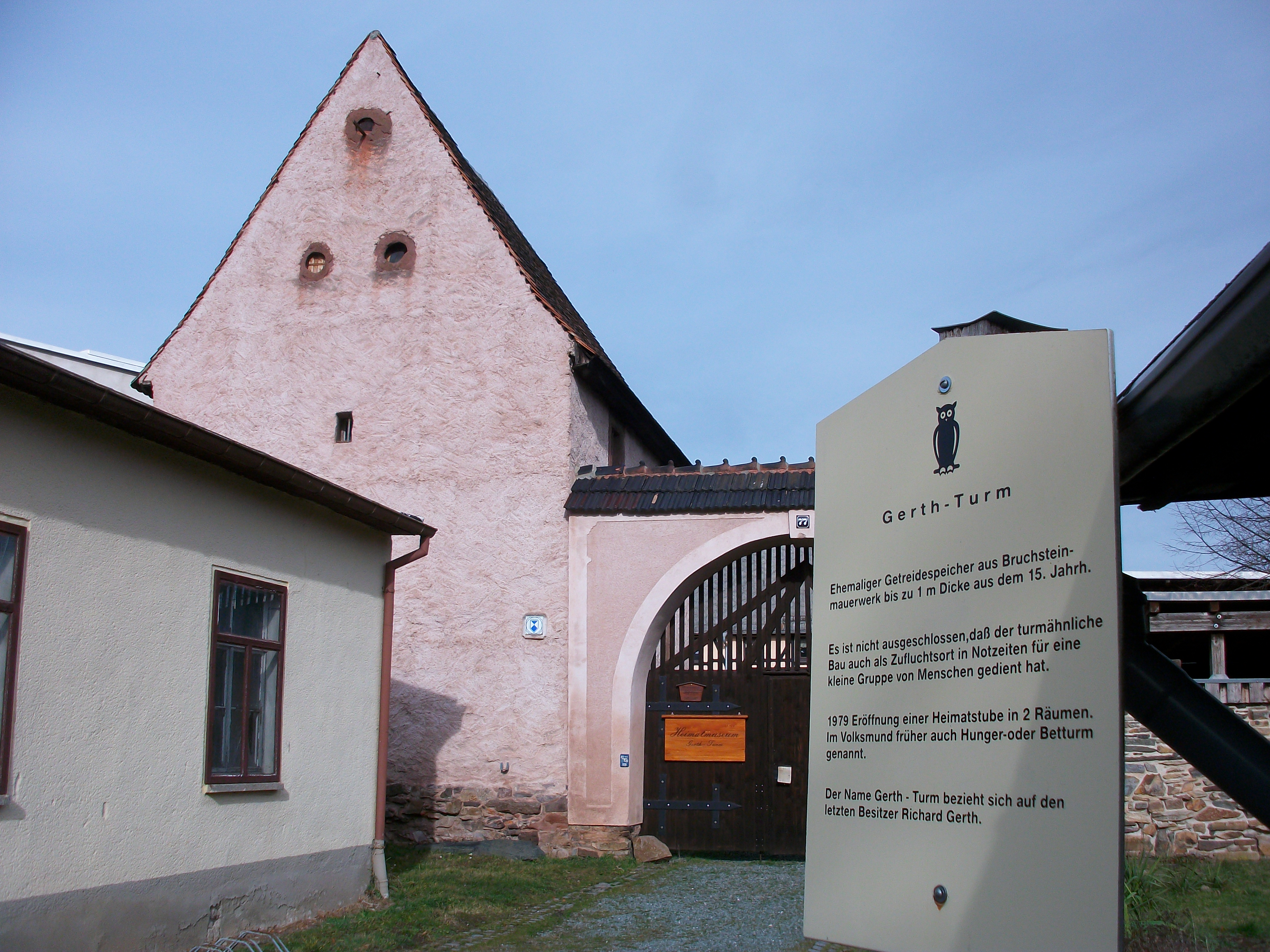 Gerth-Turm St. Egidien mit Infotafel